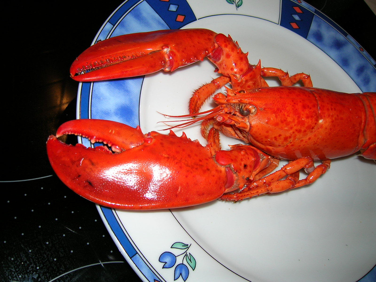 Hummer / Lobster angerichtet